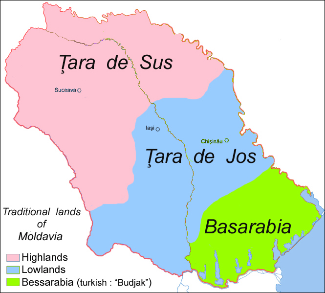 Regiunile geografico-culturale ale Principatului Moldovei.